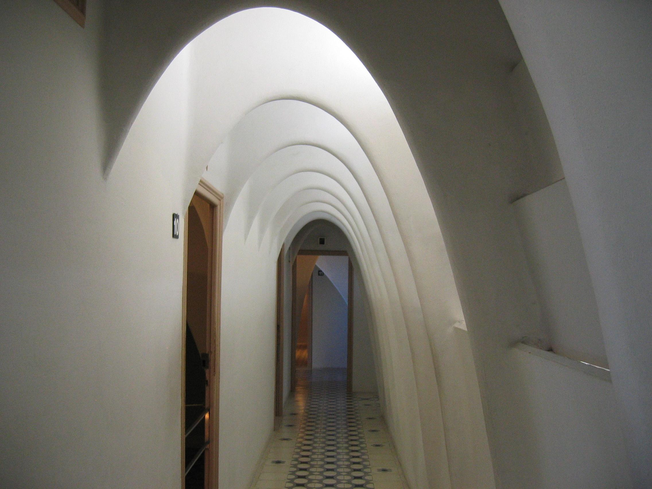 Barcelona_Casa Batlló_innen_Dachboden mit natürlichem Belüftungssystem